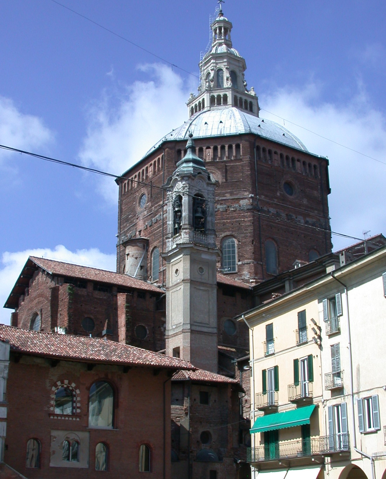 Il Duomo di Pavia